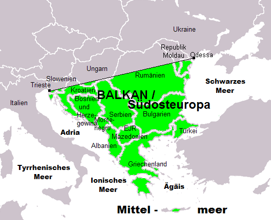 Staaten auf dem Balkan (Kosovo als Teil Serbiens betrachtet)